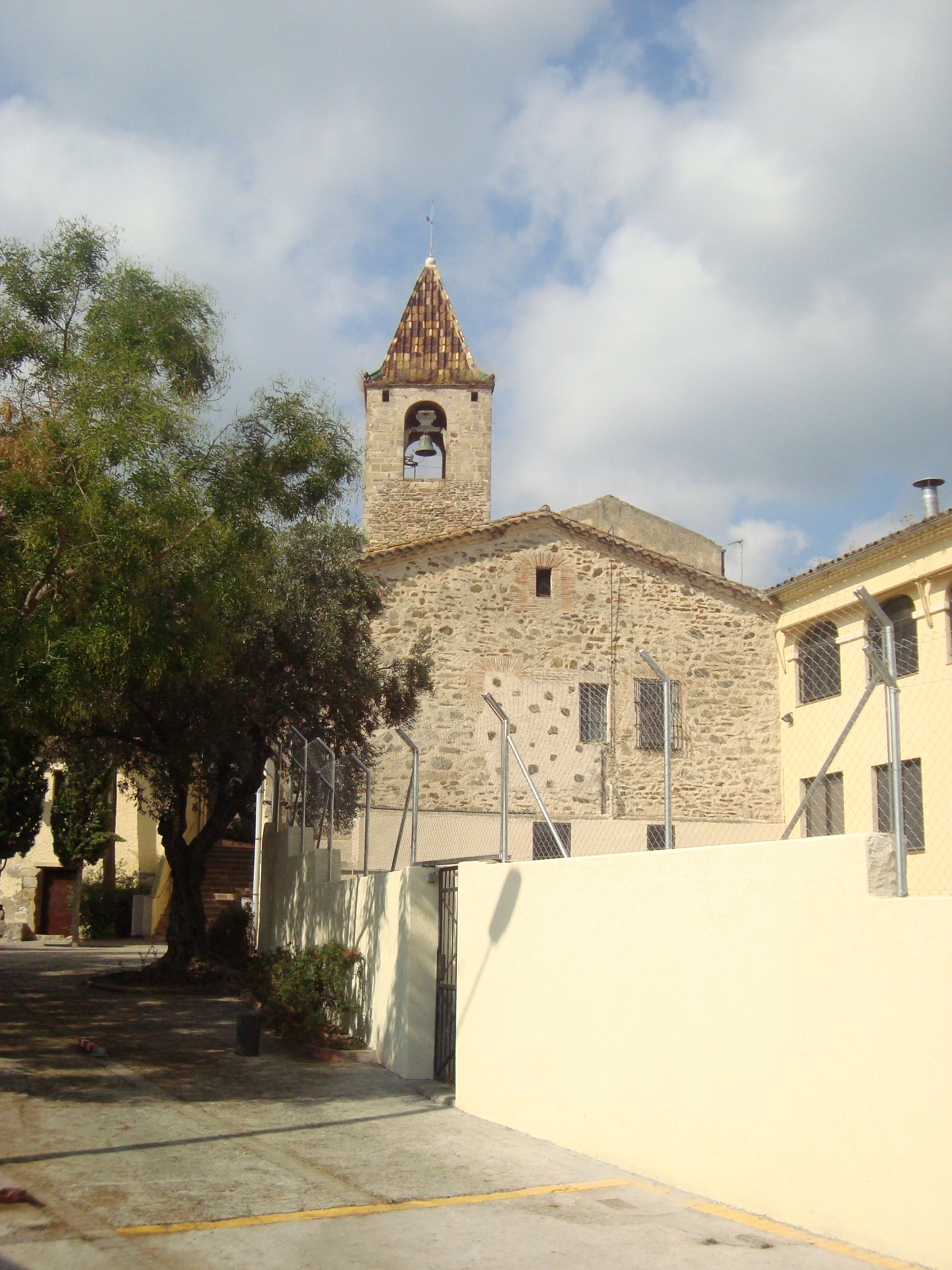 Conjunt de Sant Genís dels Agudells (Barcelona)